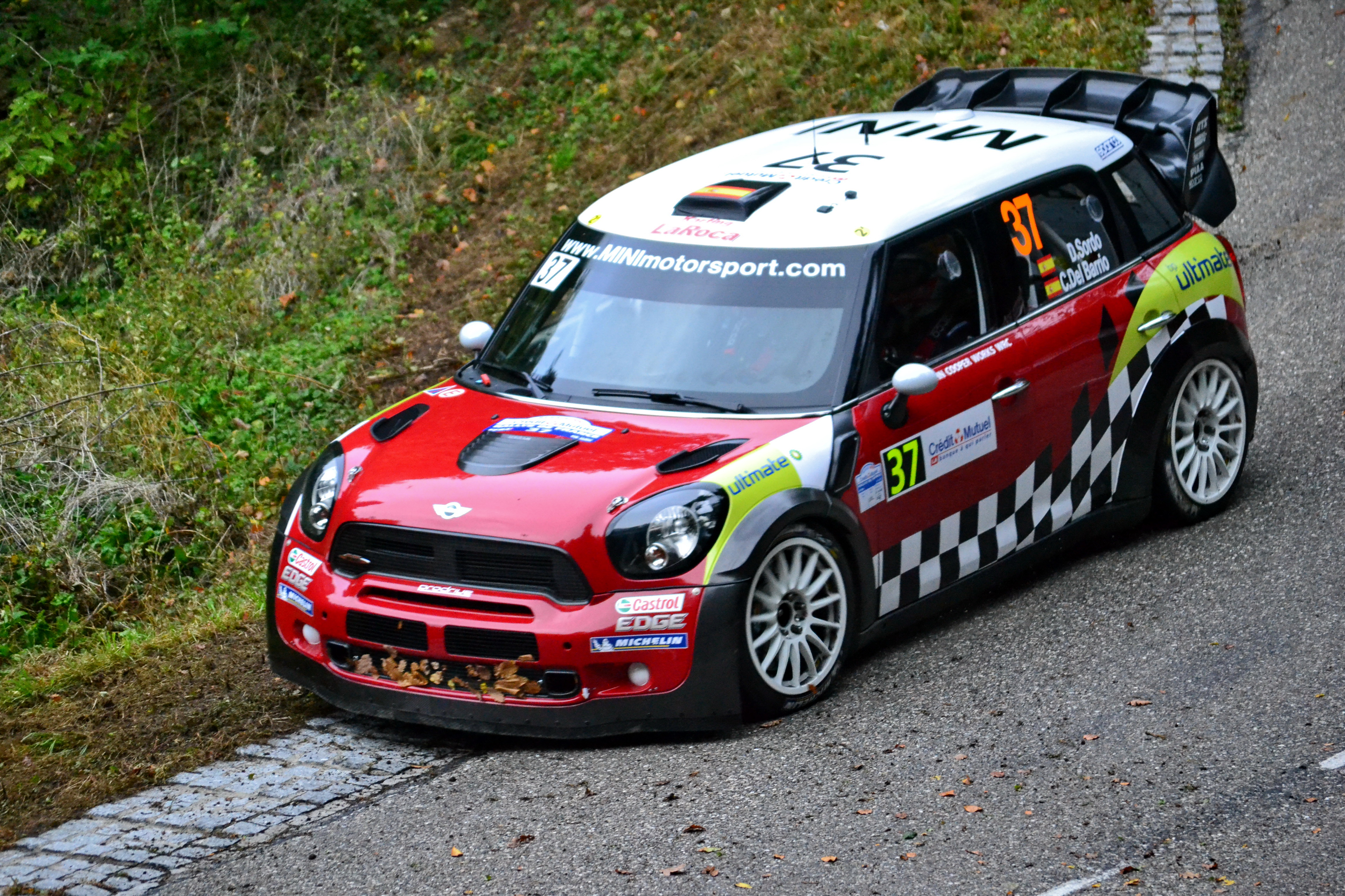 Rallye WRC France-Alsace 2012, ES2 Hohlandsbourg-Firstplan 1. MINI Countryman WRC - Dani Sordo/Carlos Del Barrio